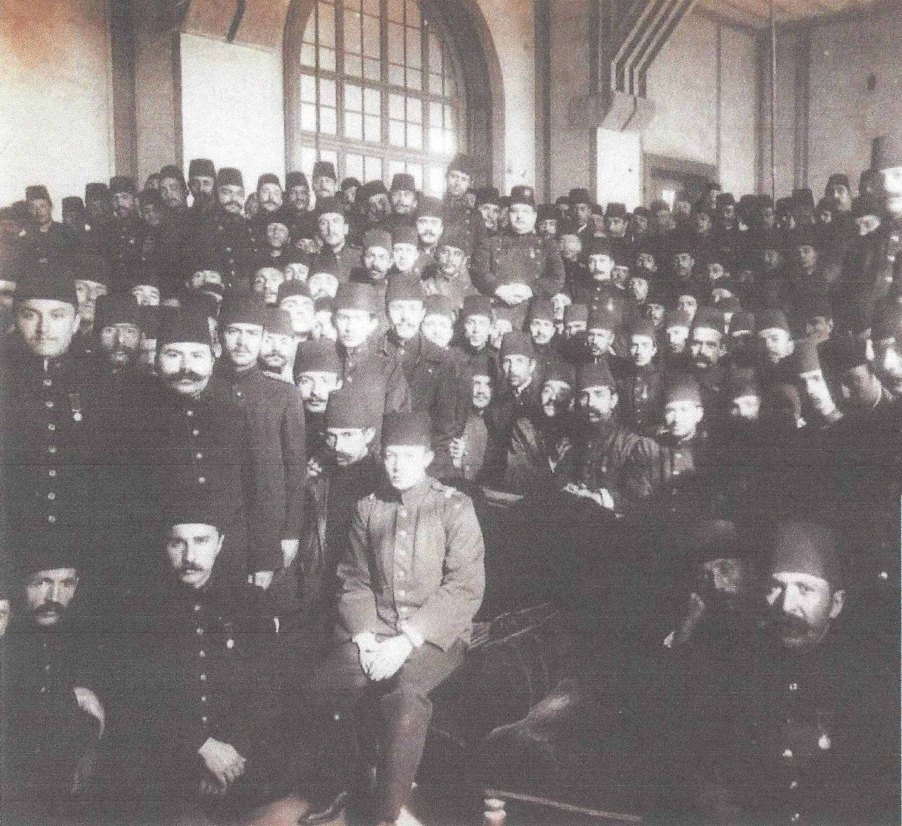 Fotografie eines von Julius Wieting eingerichteten Medizinischen Gülhane-Abends